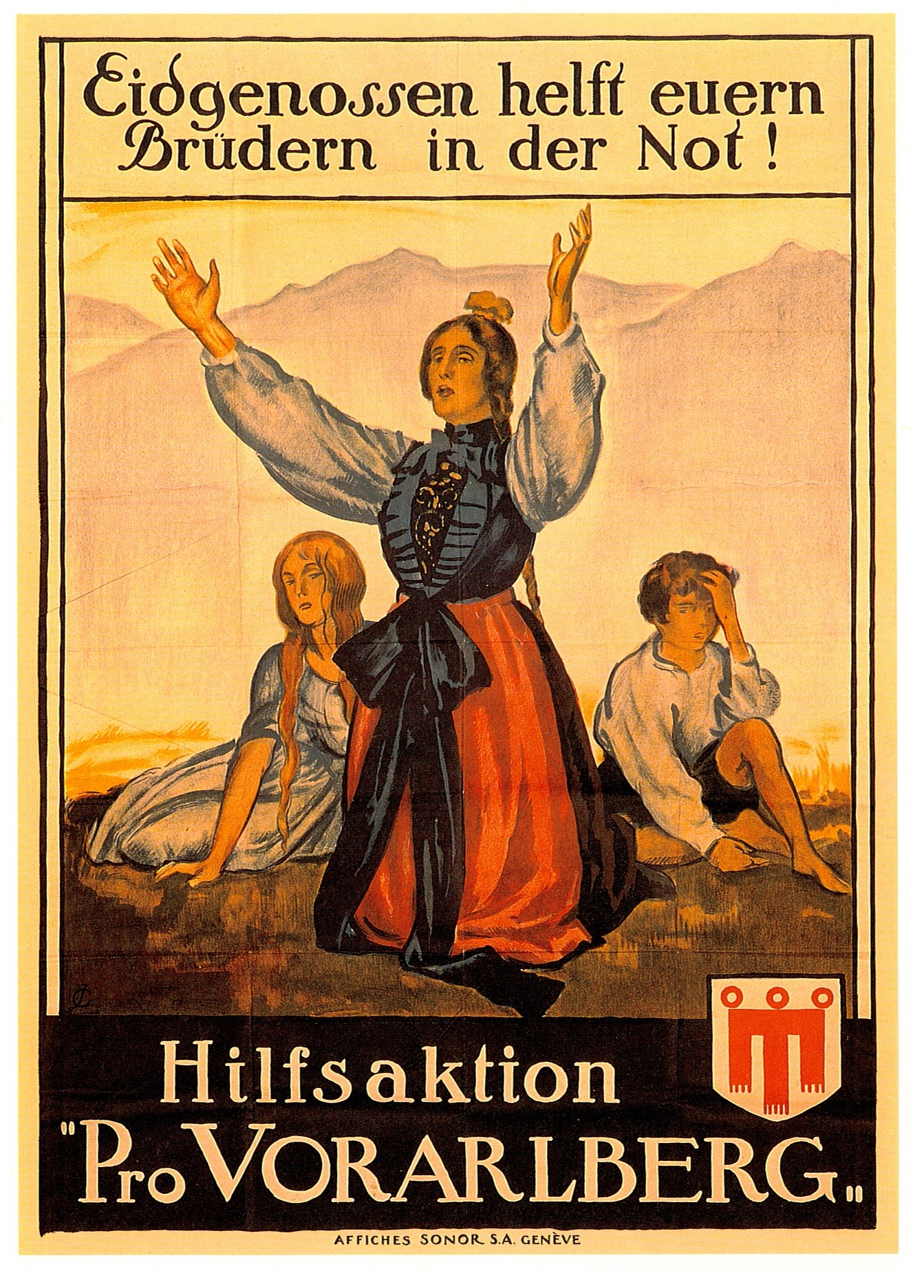 Werbeplakat des Komitées "Pro Vorarlberg" 1919/20 des Schweizer Malers Jules Courvoisier 1884-1936.